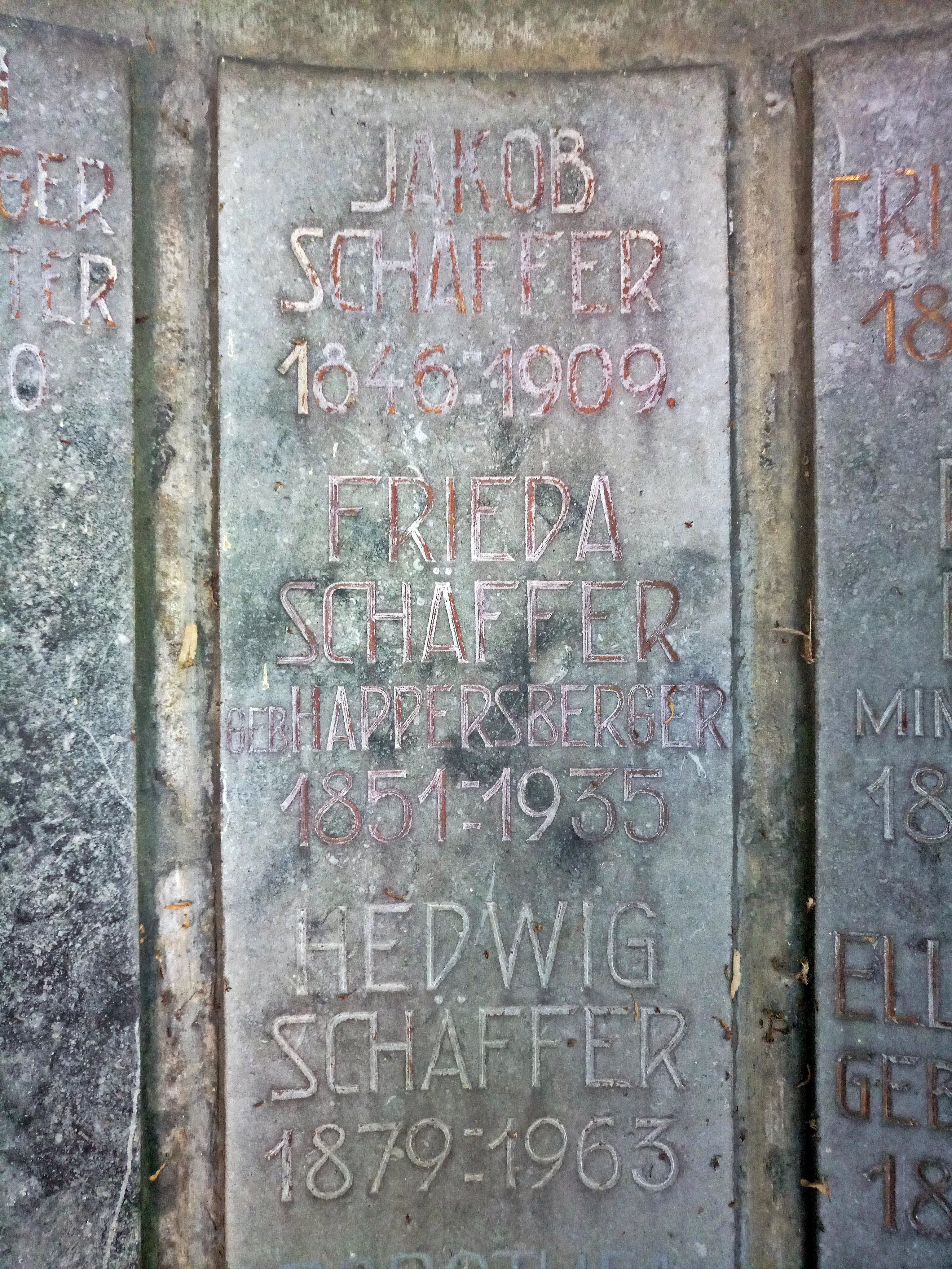 Grabinschrift Fabrikantenfamilie Schäffer, Friedhof Grünstadt, dabei auch die Malerin Hedwig Schäffer (1879-1963)